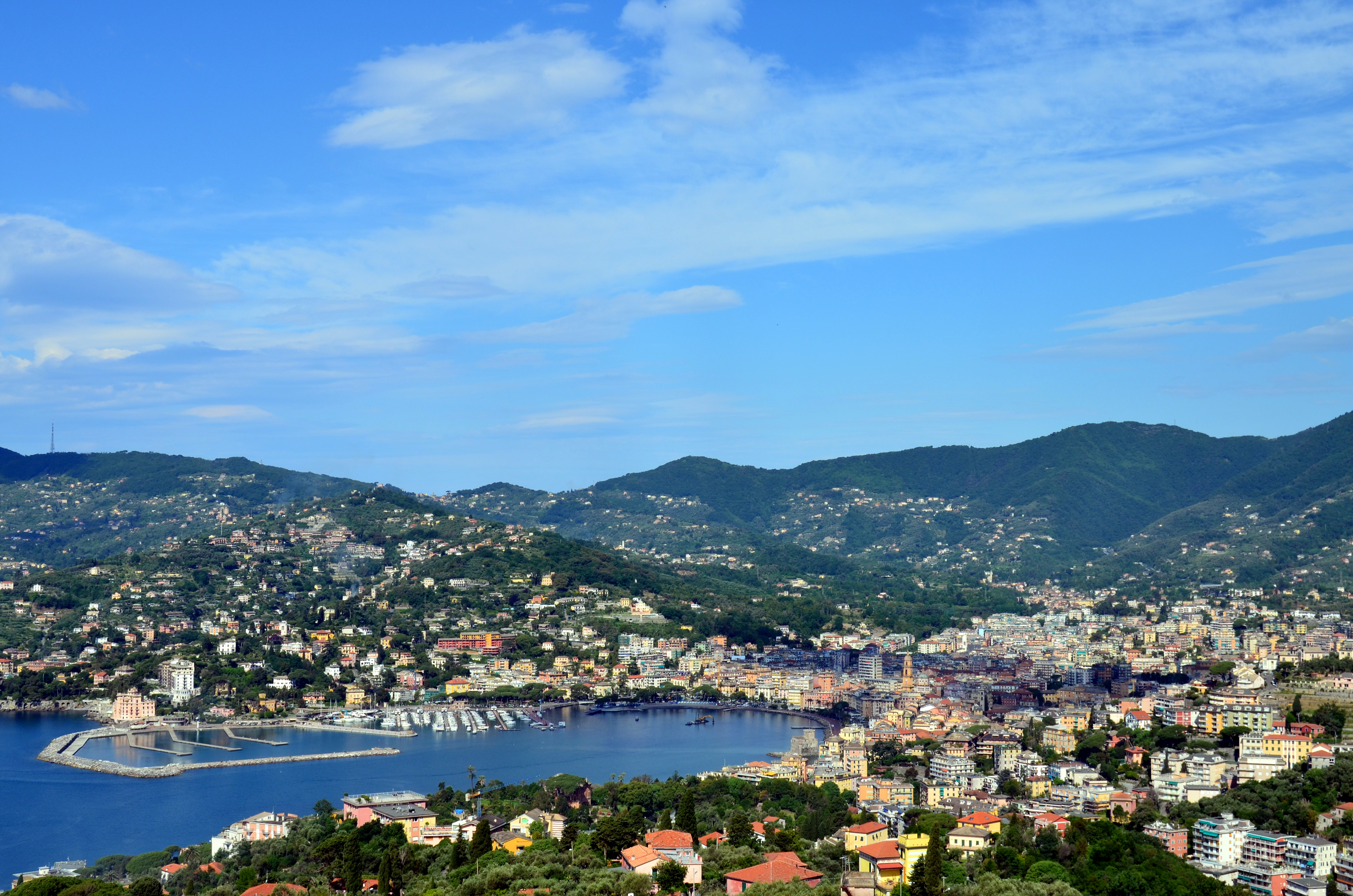 Panorama di Rapallo dalla frazione di Sant'Ambrogio di Zoagli, Liguria, Italia